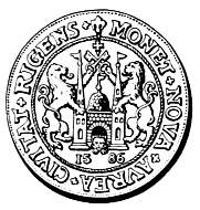 Münze von 1586 mit dem Wappen der Stadt Riga